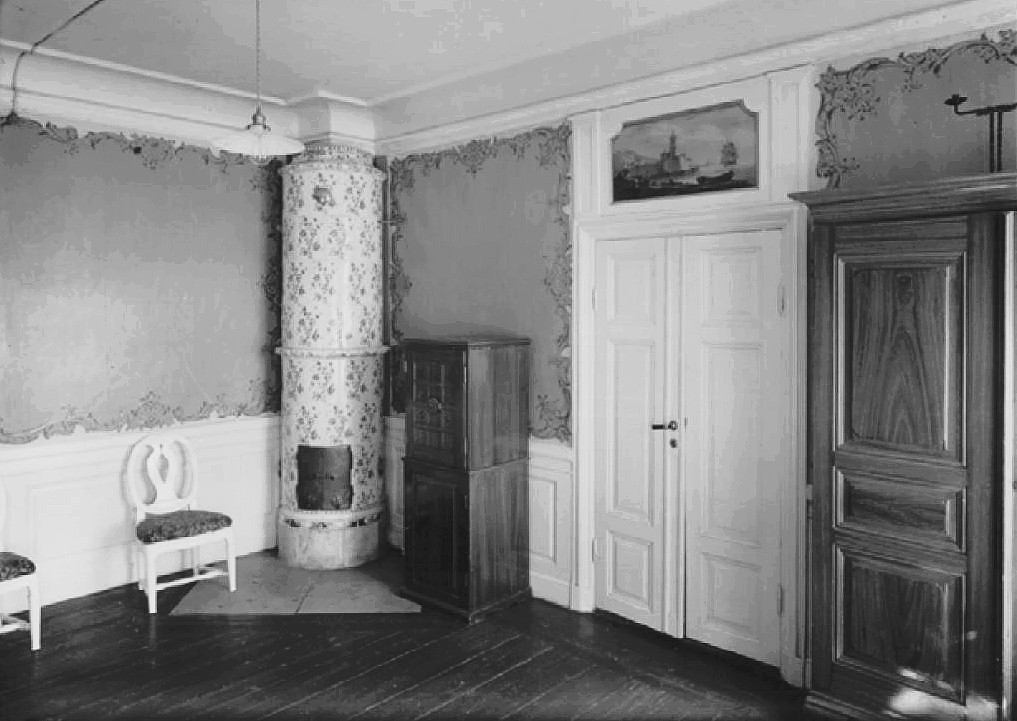 Kristineberg, Blå kammaren på våningen 1 trappa, vy mot nordost.